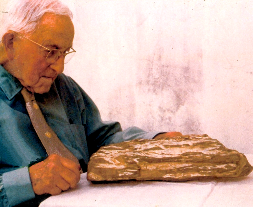 Dr. Dillman S. Bullock, examinand un trozo de madera petrificada con sonido metálico en oficinas de su museo, Angol, Chile